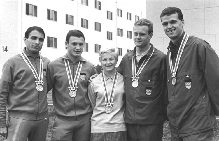 Zentralbild-Kohls 17.10.1964 XVIII. Olympische Sommerspiele 1964 in Tokio. Medaillengewinner der DDR. UBz. V.l.n.r.: Dieter Lindner (Silbermedaille), Egon Henninger (Silbermedaille), Ingrid Engel-Krämer ( 1 Gold- und 1 Silbermedaille), Frank Wiegand (2 Silbermedaillen) und Horst-Günter Gregor (Silbermedaille) sind stolz auf ihre Medaillen.